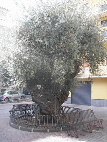 Uno degli Ulivi Millenari, nella piazza omonima di Santa Maria di Licodia. Definiti i più antichi di Sicilia. Santa Maria di Licodia.